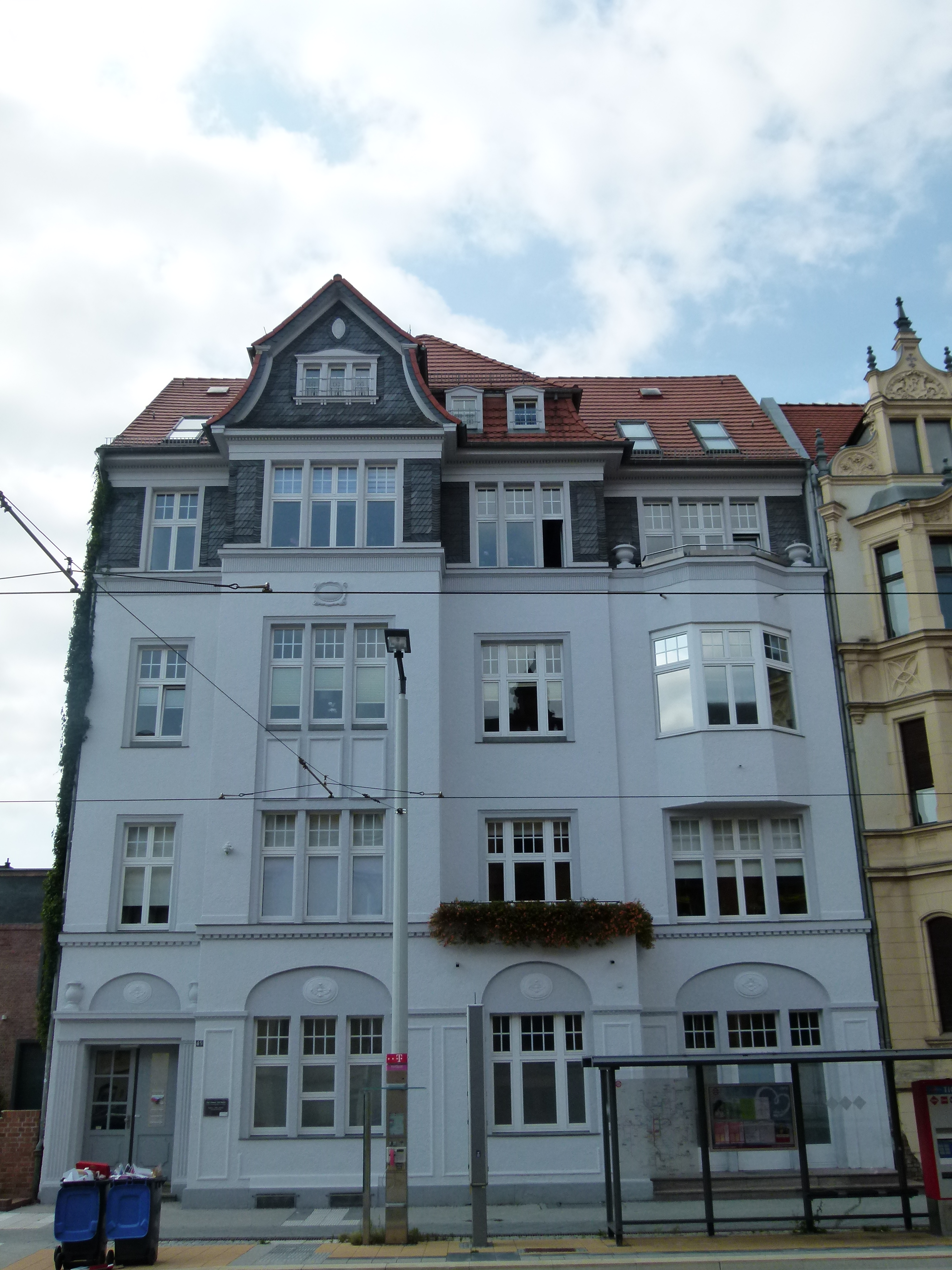 49 Bahnhofstraße 2014